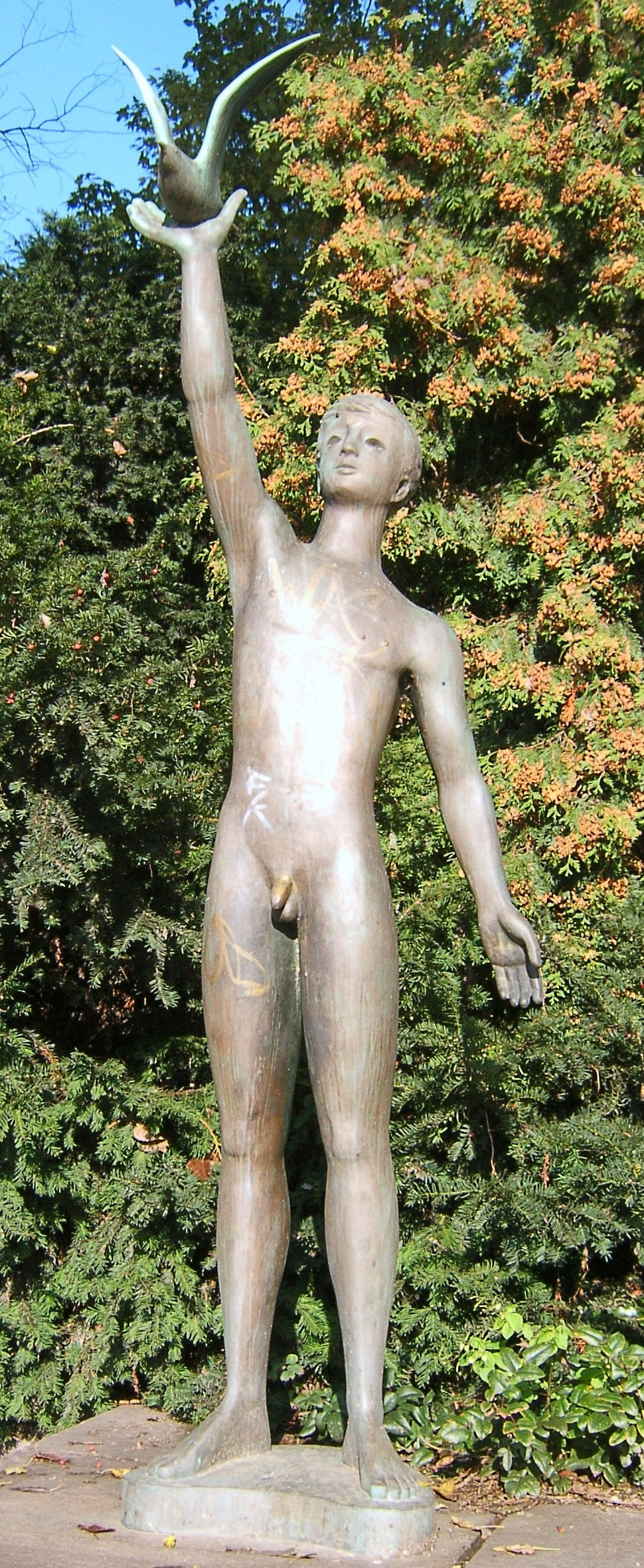 Bildbeschreibung: Jüngling mit Möwe (1955) Hamburg, Figur Kennedybrücke Fotograf eigene Aufnahme Datum: 2004